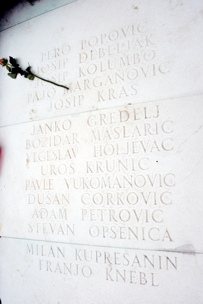 Grobnica narodnih heroja na Mirogoju, Zagreb, Hrvatska